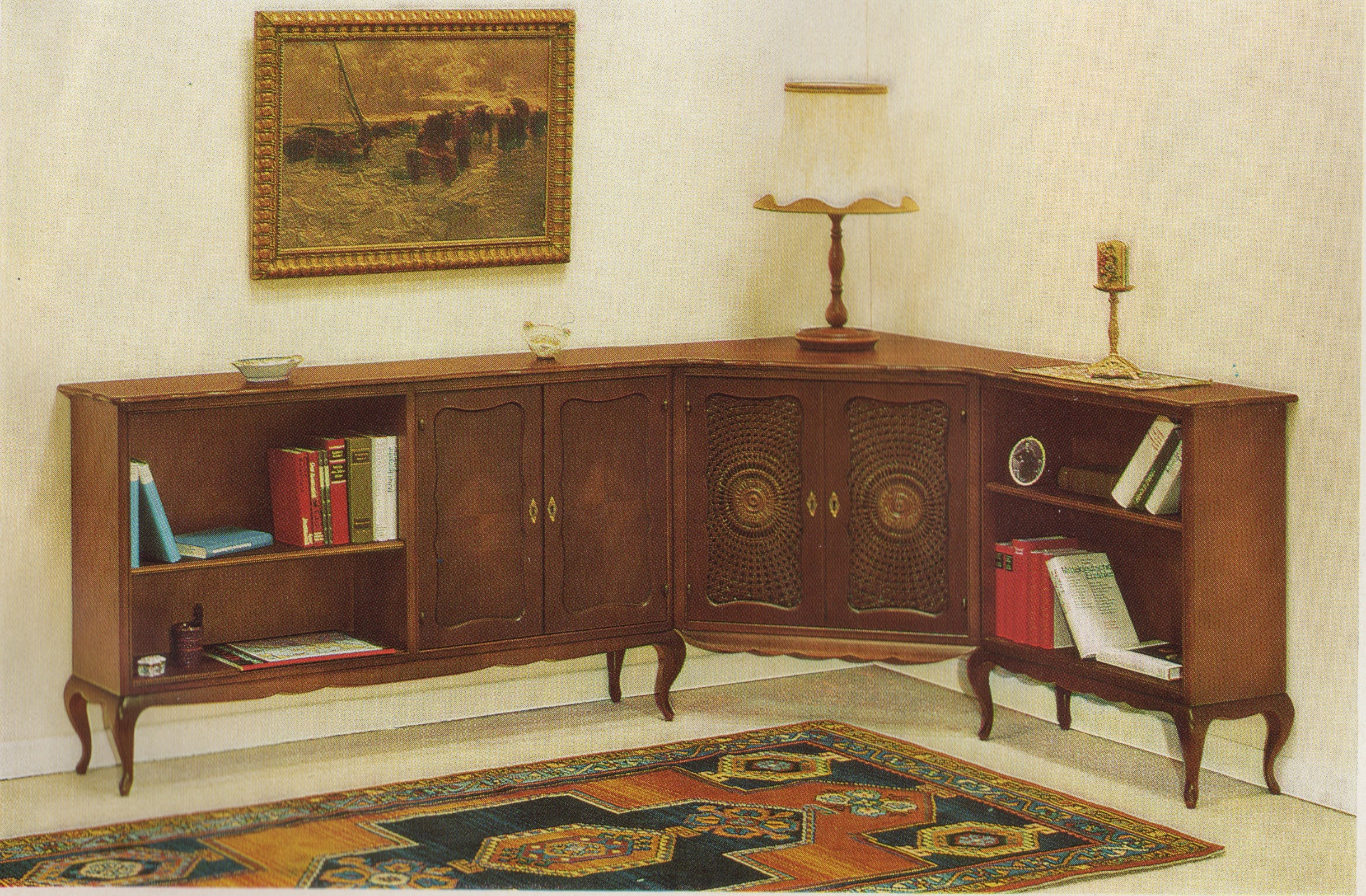 Bücherregale C, Eckkombination 204 x 141cm, Fernsehschranktüren mit Sonnenrohrgeflecht, Chippendale, Holzwarenfabrik Friedrich Schwertfeger Steinheim/Westfalen, 1950er Jahre